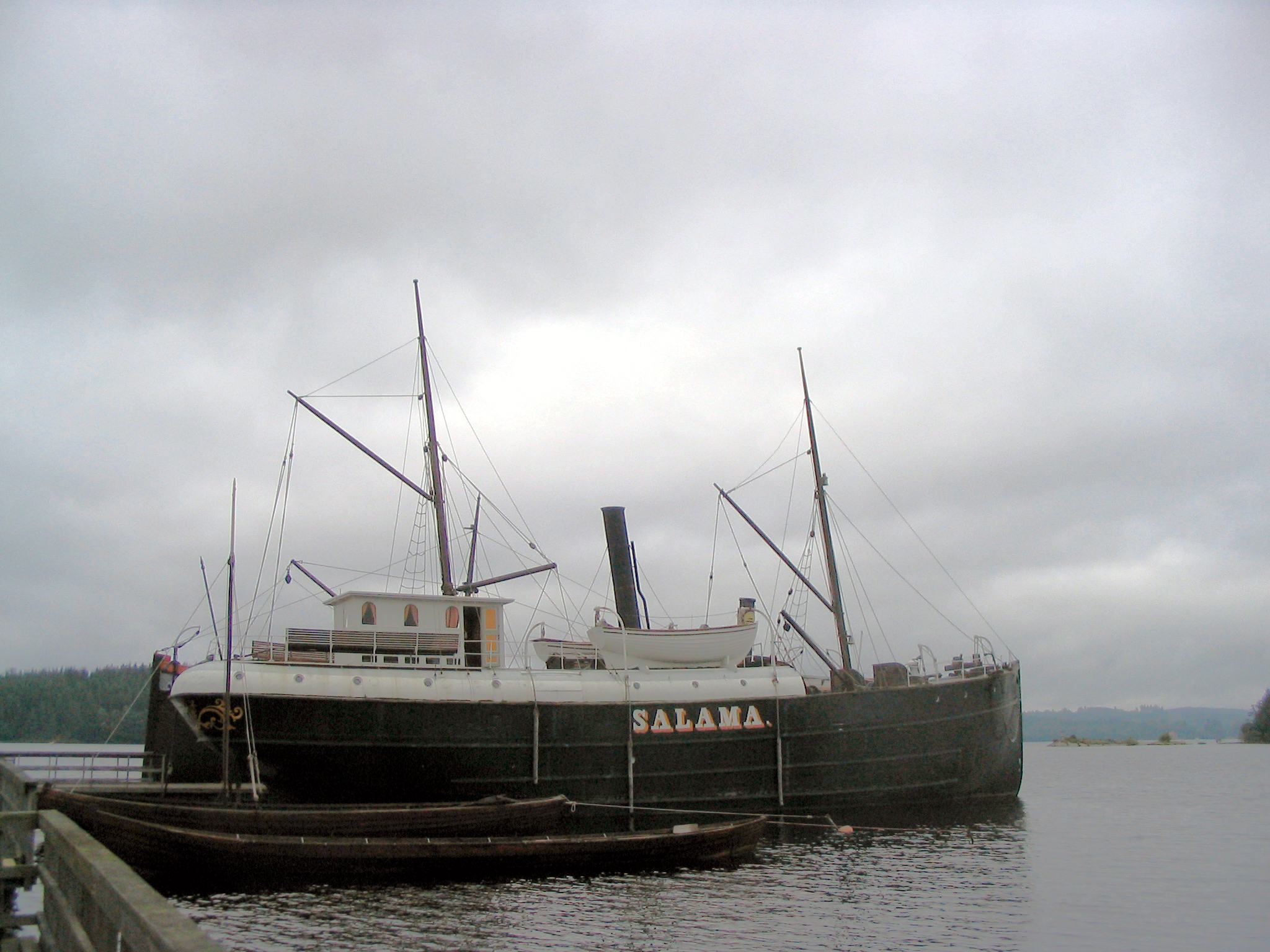 Höyrykuunari Salama